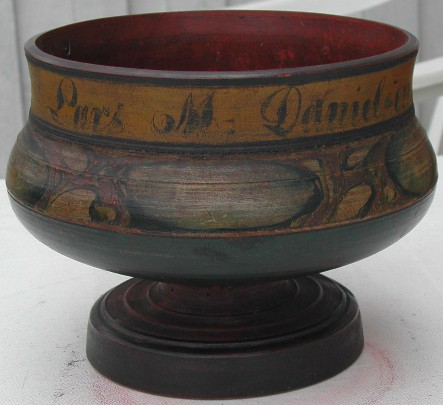 Ølbolle frå Vefsn